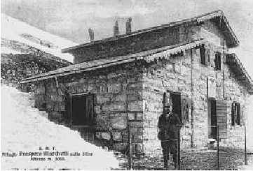 Il Rifugio Prospero Marchetti sul Monte Stivo in una cartolina del 1911